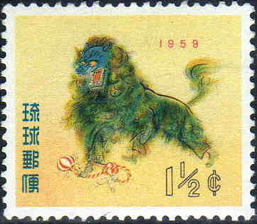 米軍占領下の沖縄で郵便事業をしていた琉球郵便が1959年用年賀切手として発行した切手。